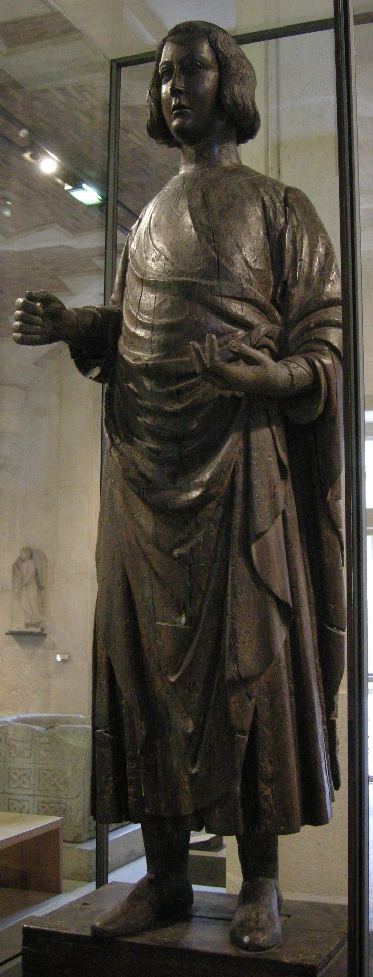 Giovanni d'agostino (attr.), sant'ansano.JPG